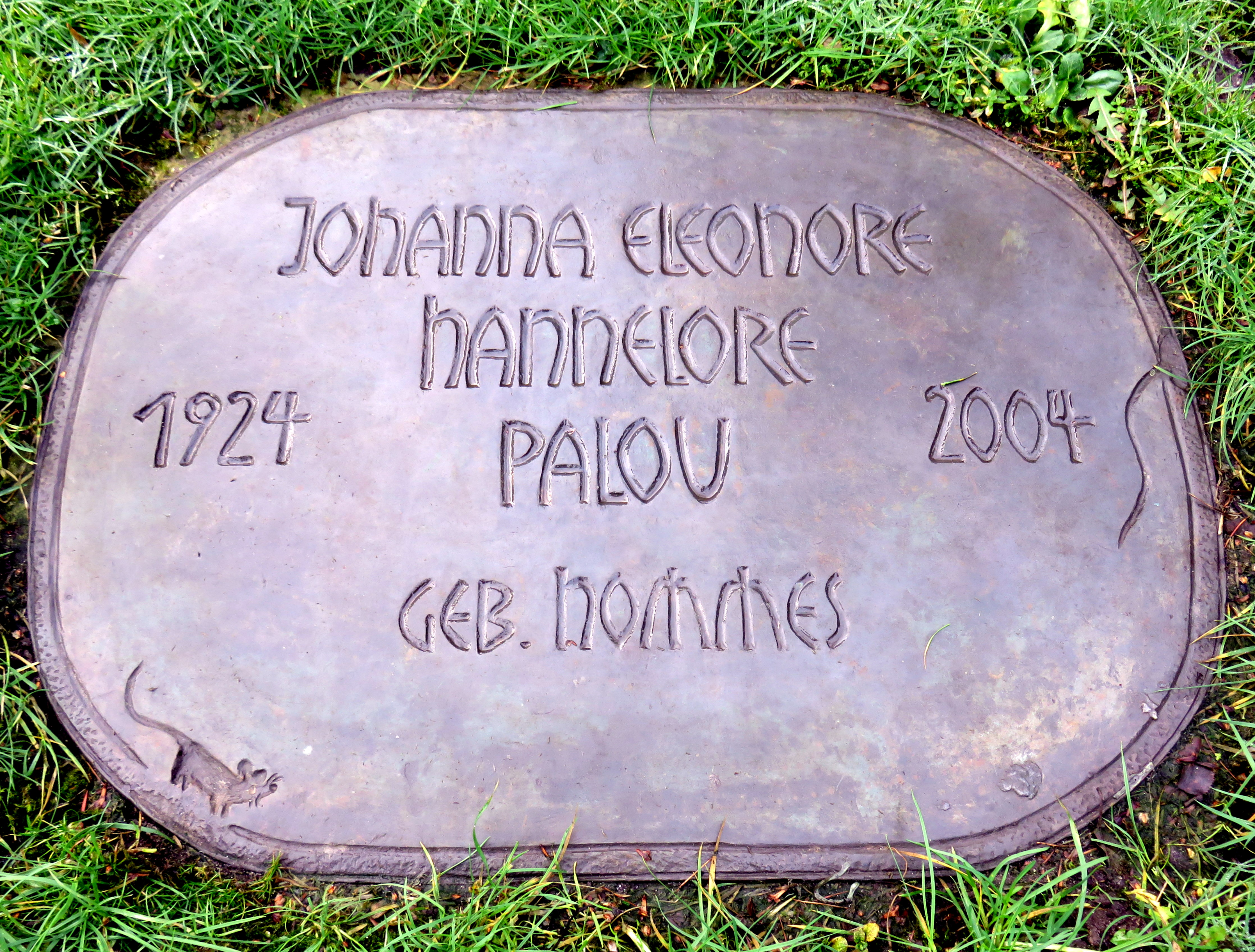 Kleines Kissenstein-Grabfeld auf dem Ohlsdorfer Friedhof, Planquadrat P 27 (unmittelbar östlich an den Garten der Frauen angrenzend). An der Stirnseite des feldes befindet sich der ehemalige Grabstein für Louis und Antonie Fuchs, 1936 für den Standtort Q 22 (nördlich Cordesallee, west of Waldstraße) vom deutschen Bildhauer Oskar Witt geschaffen. Nach Ablauf der Laufzeit wurde der Stein bis auf weiteres vom Friedhof in Verwahrung genommen. Einer der Kissensteine wurde 2004 von der deutschen Bildhauerin Gisela Engelin-Hommes für ihre Verwandte Johanna Eleonore Hannelore Palou geschaffen.